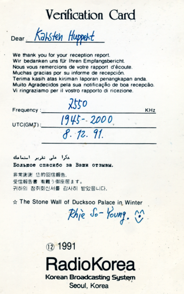 Radio Korea QSL card